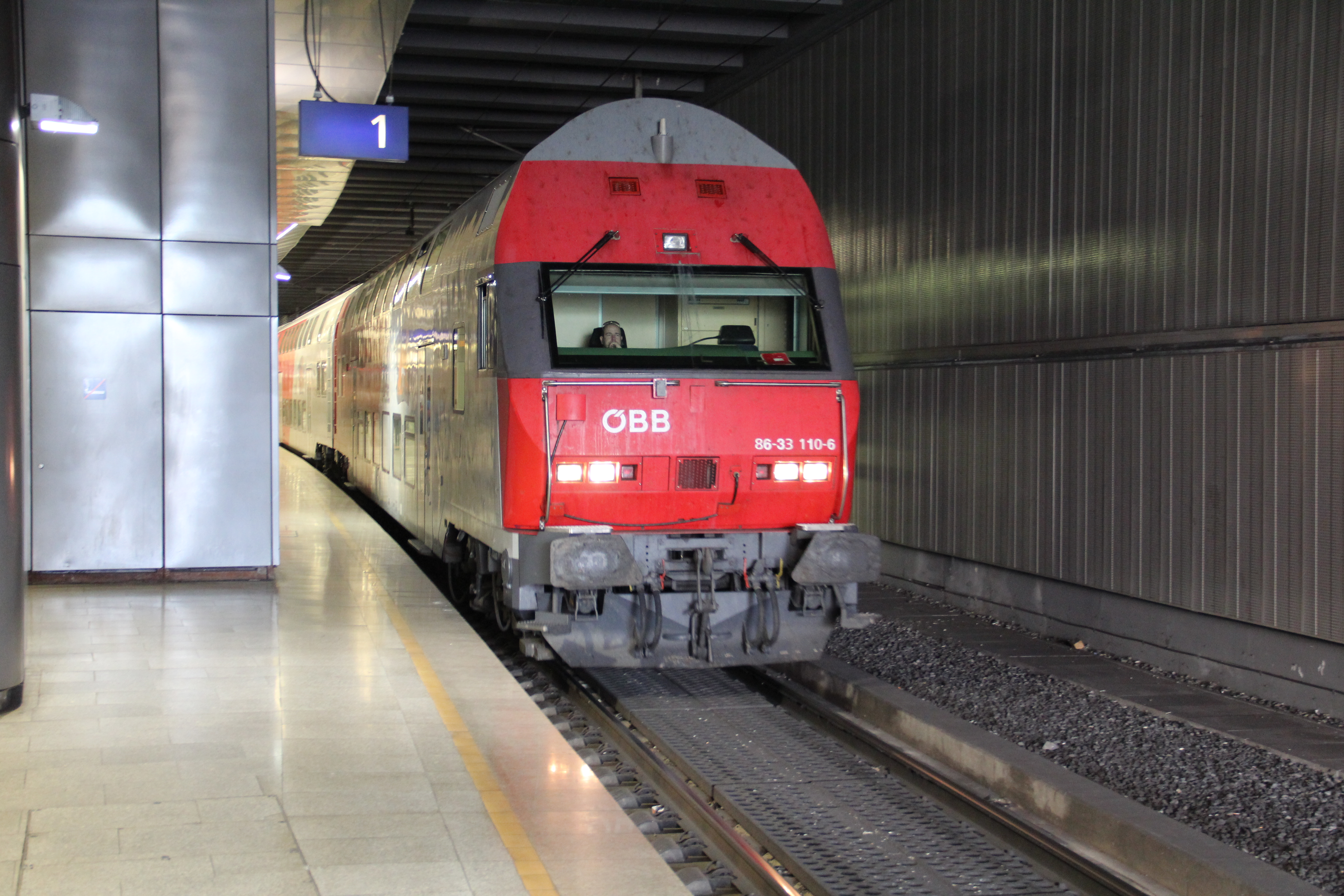 Ein Regionalzug wartet in der Haltestelle Wien Rennweg auf die Weiterfahrt Richtung Floridsdorf. Der Steuerwagen ist voraus, eine ÖBB 1116 schiebt den Zug.